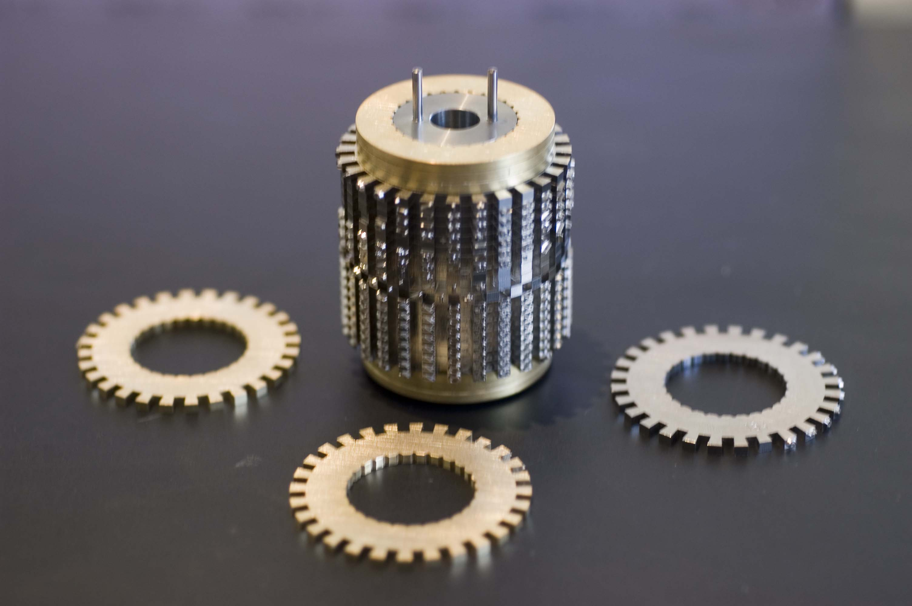 selbst fotografiert Ort: BHW St.Jakob Zürich